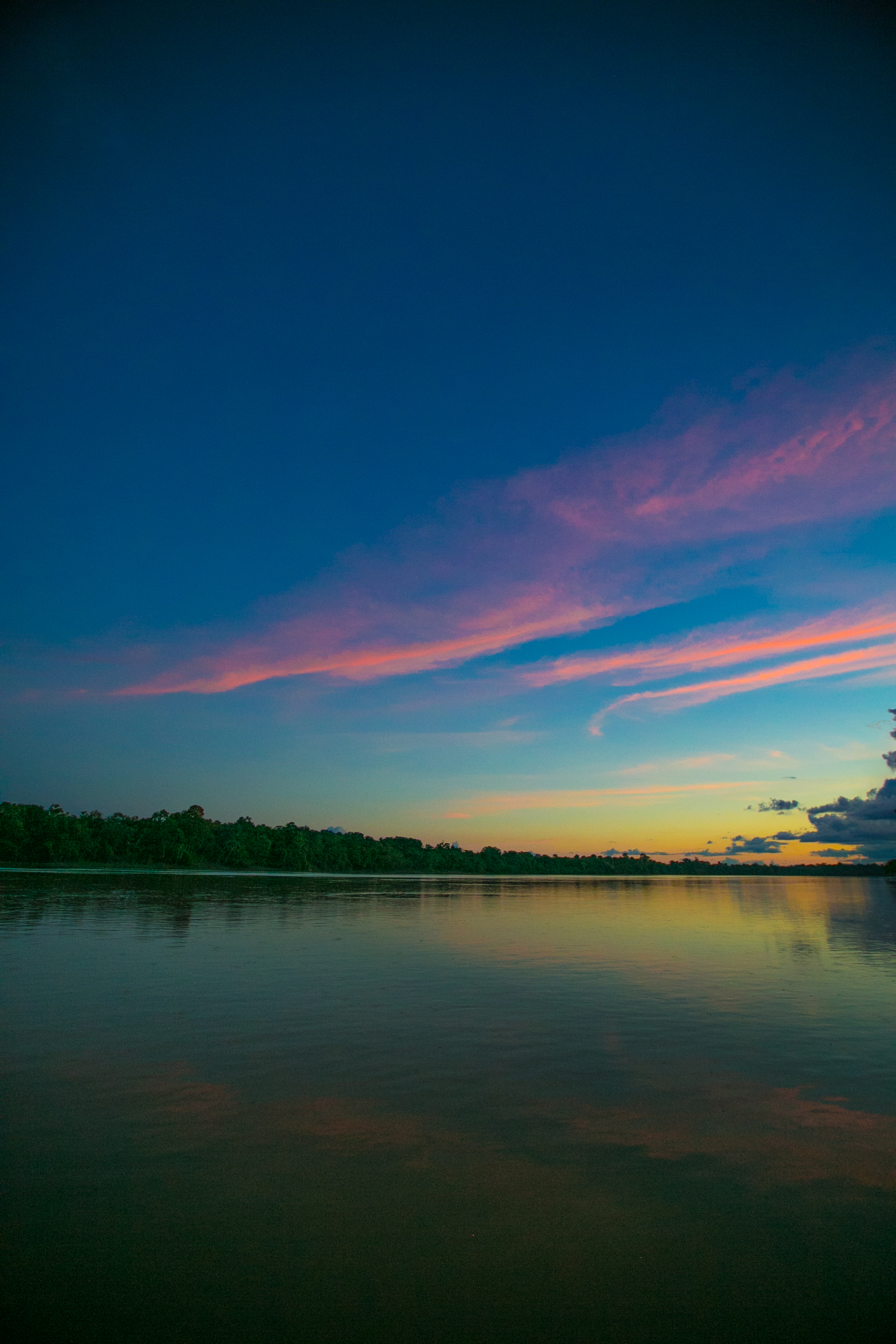 Fim de tarde, as margens do Médio Rio Juruá, próximo à cidade de Carauari - AM.